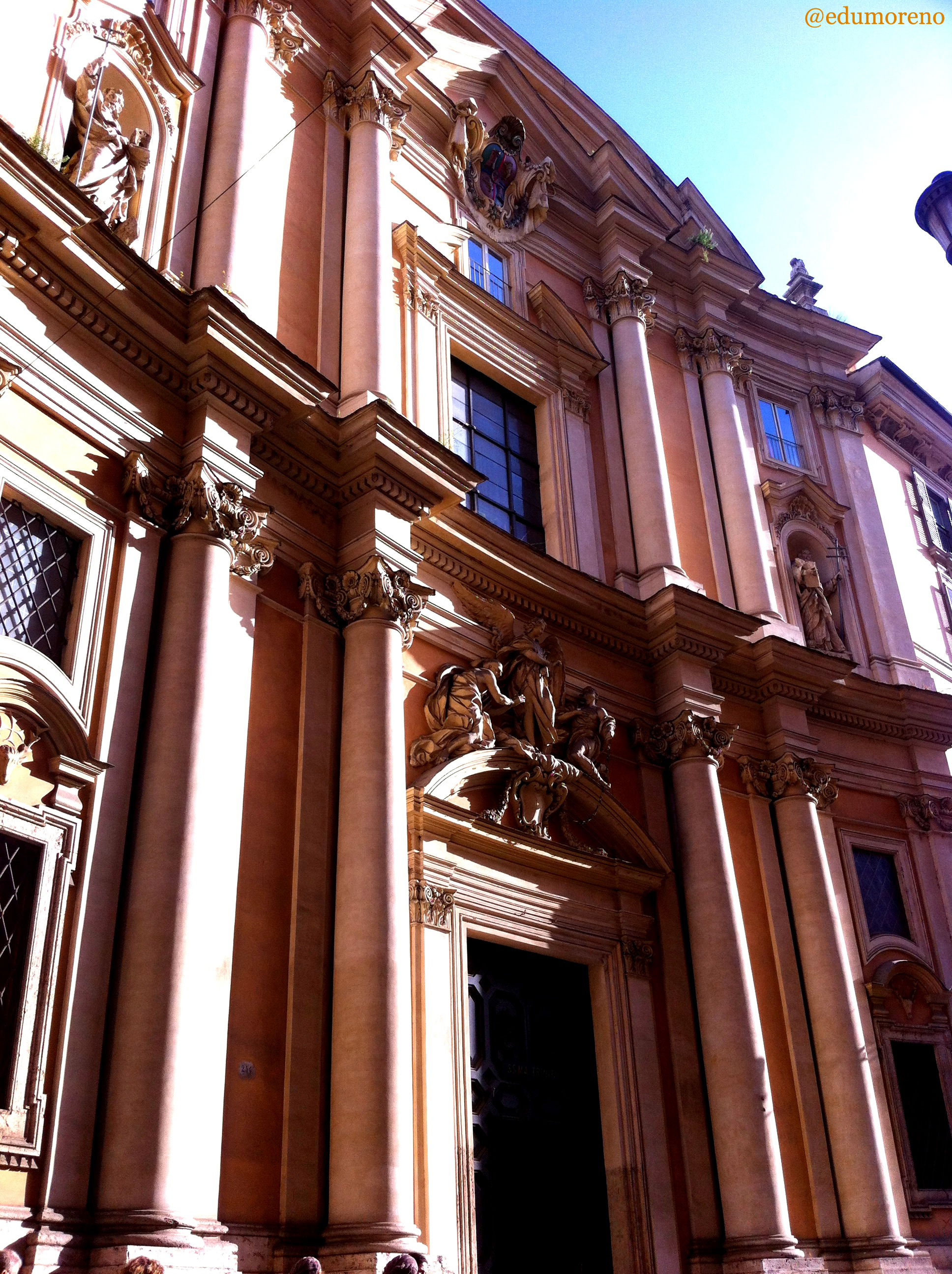 Fachada de la Iglesia de la Santísima Trinidad de los Españoles en Roma